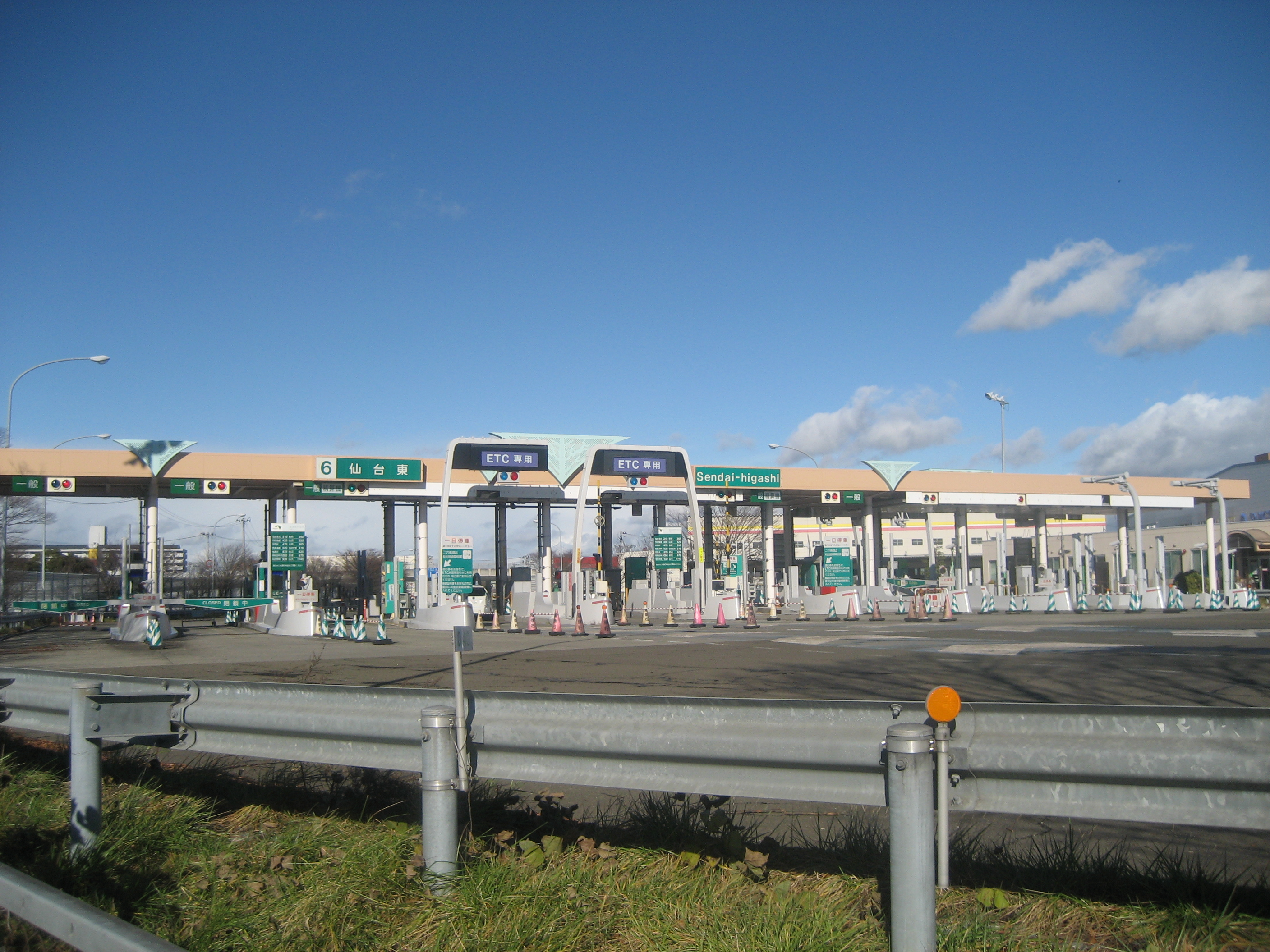 仙台東部道路仙台東インターチェンジ料金所